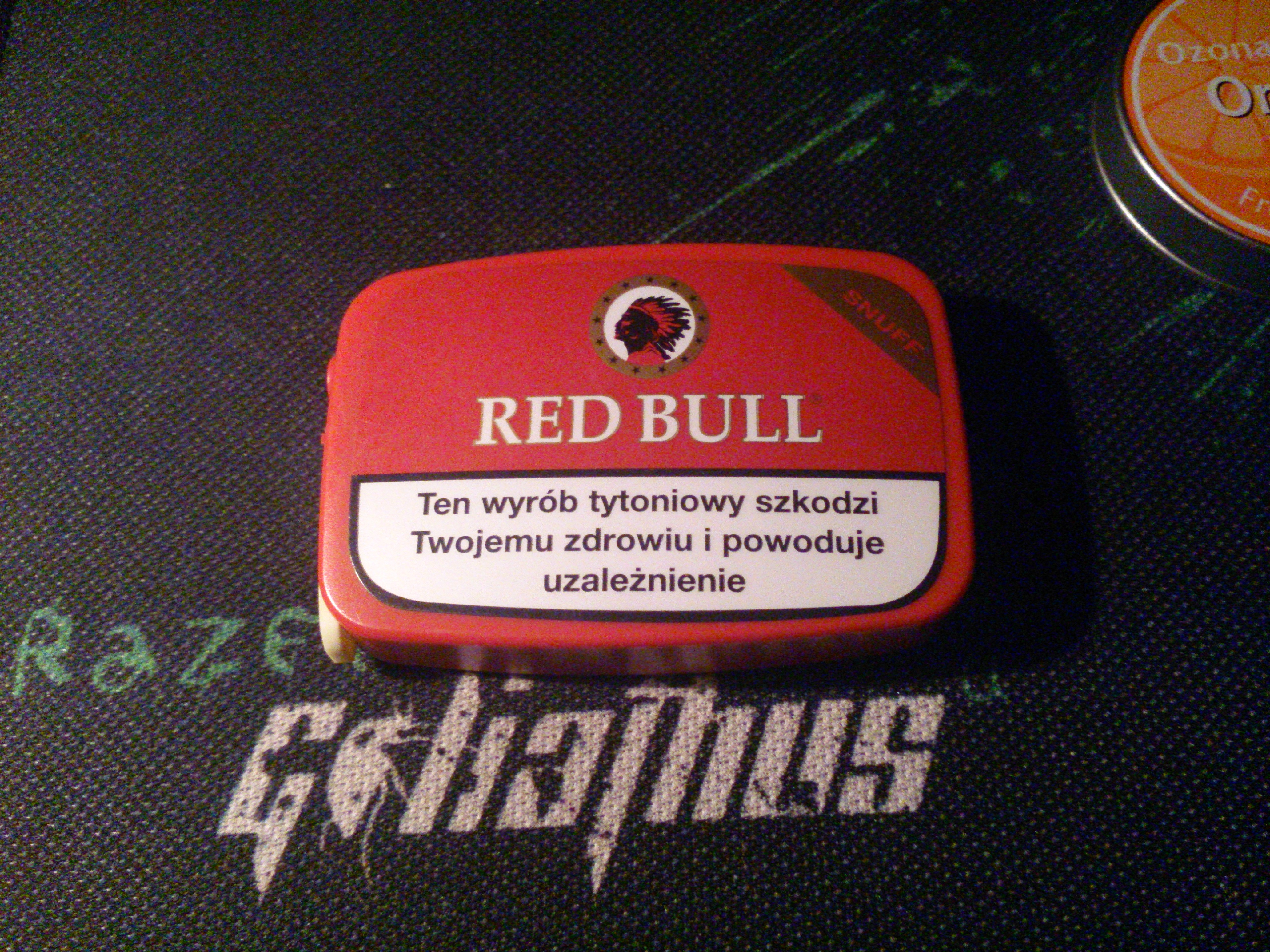 Popularna tabaka Red Bull